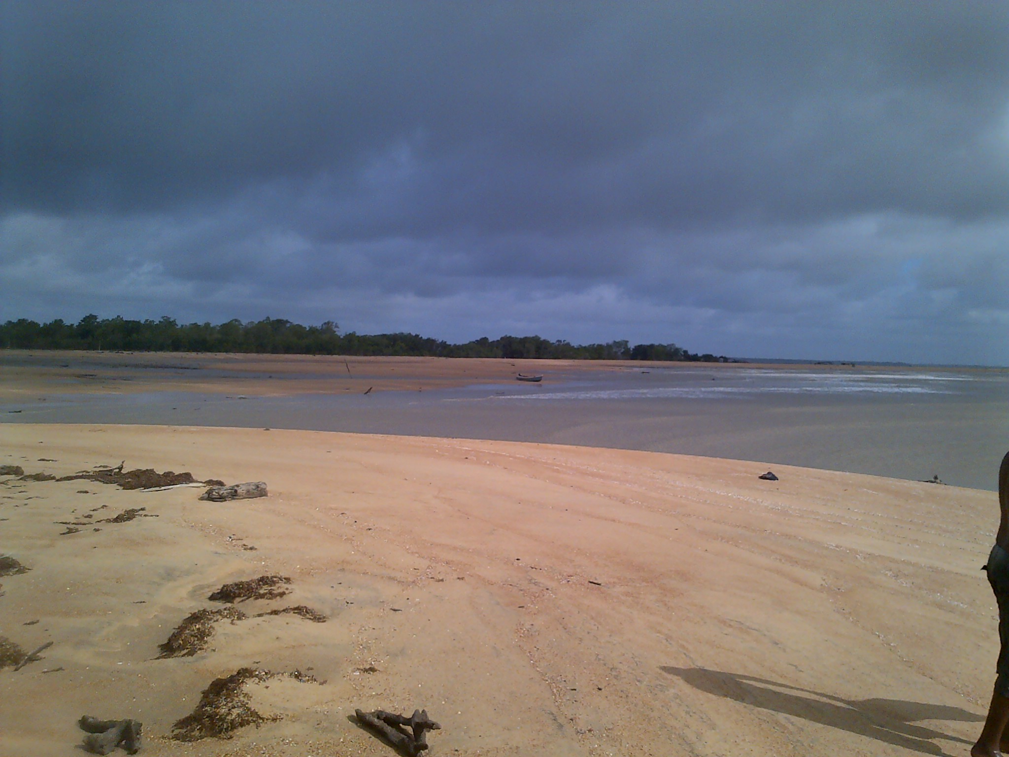 zandstrand van Braamspunt met mangrovebos in de verte